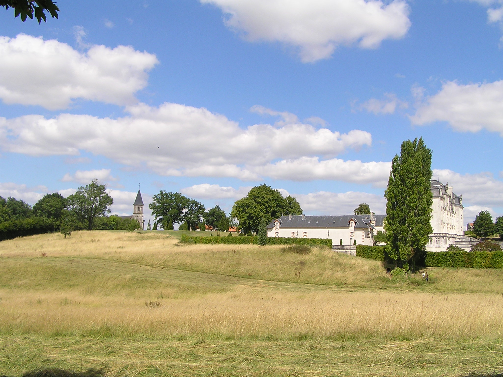 château de Montchaude, de l'ouest